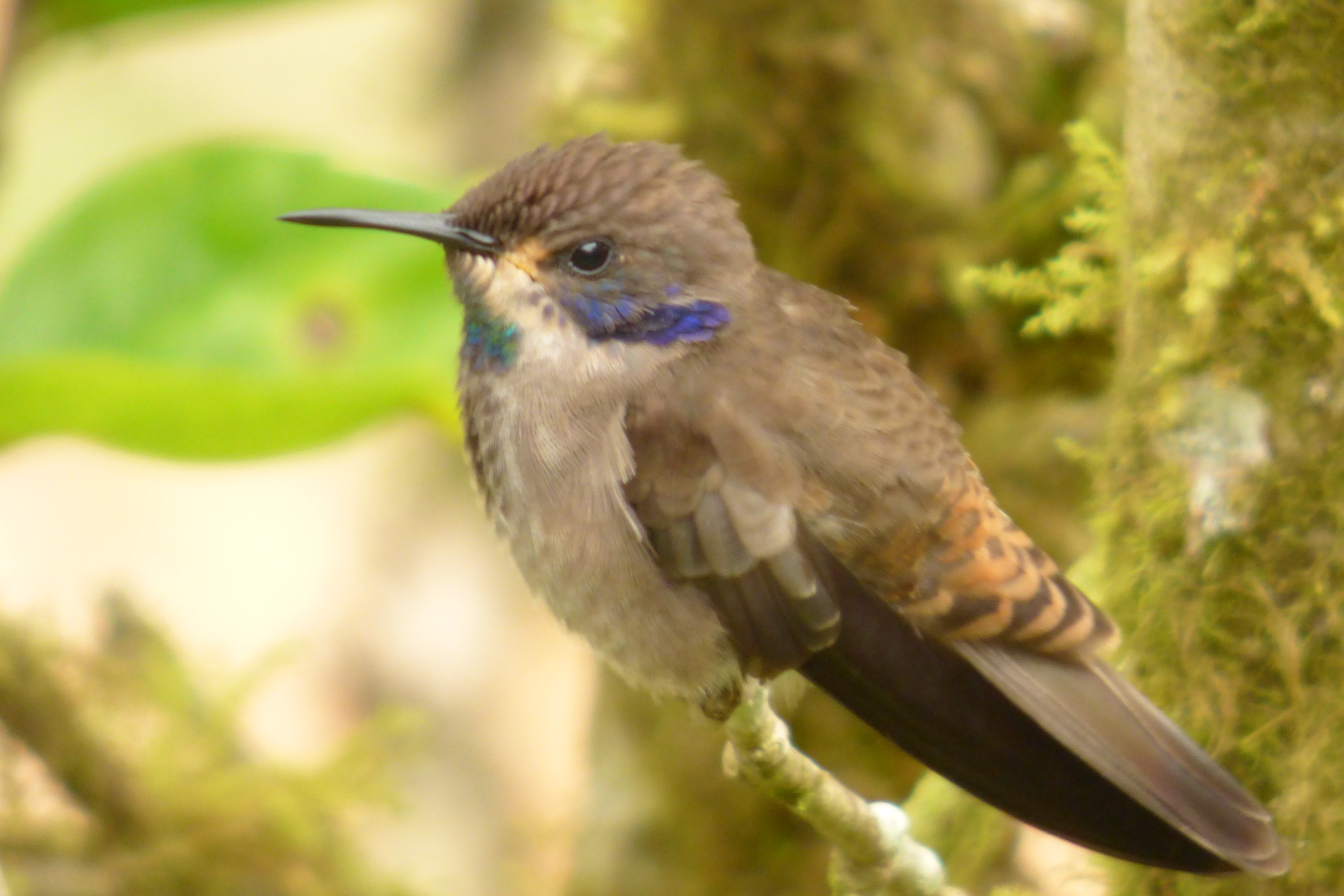 Colibri delphinae (Chillón pardo)